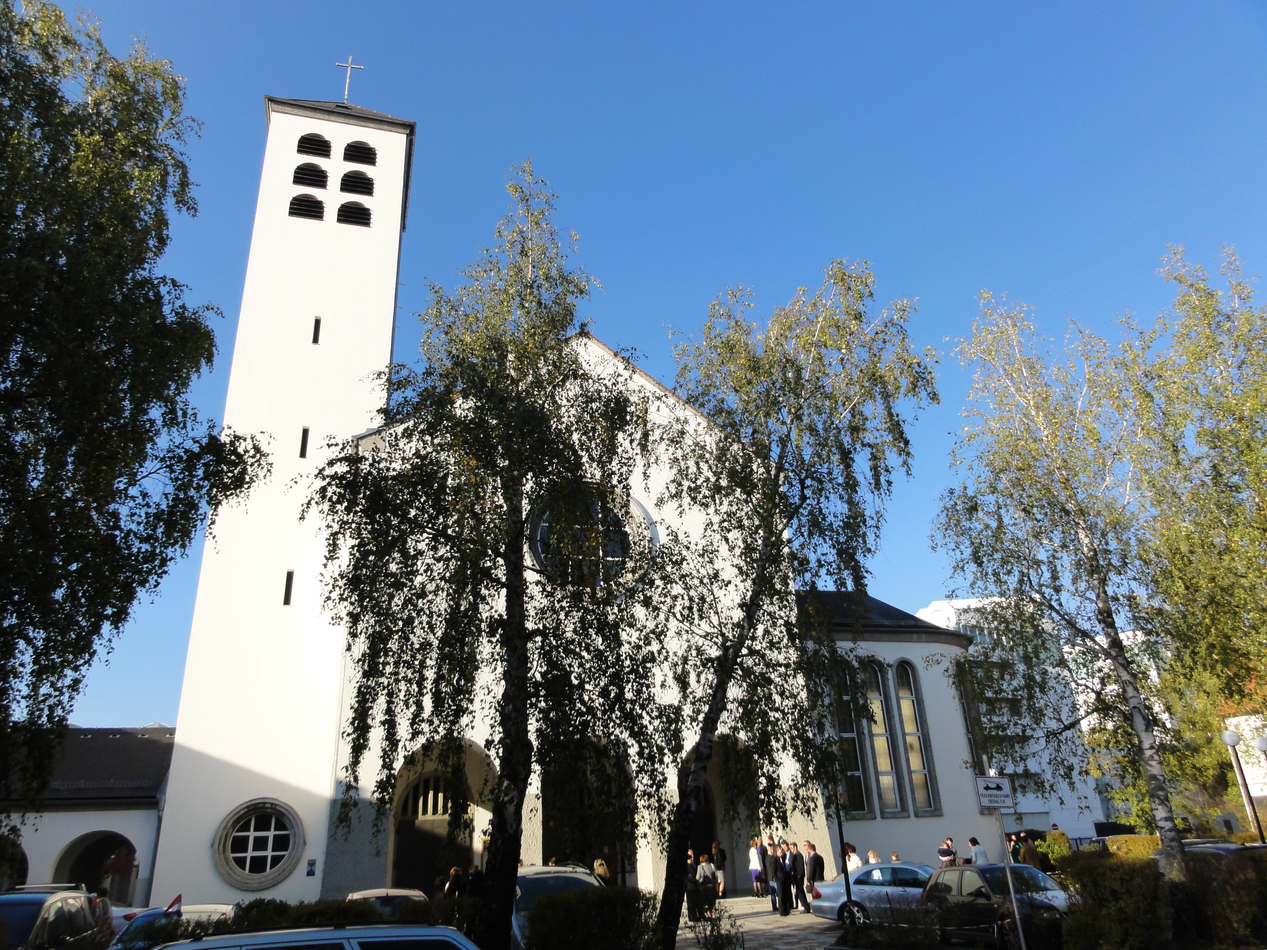 Kath. Pfarrkirche Heilige Familie